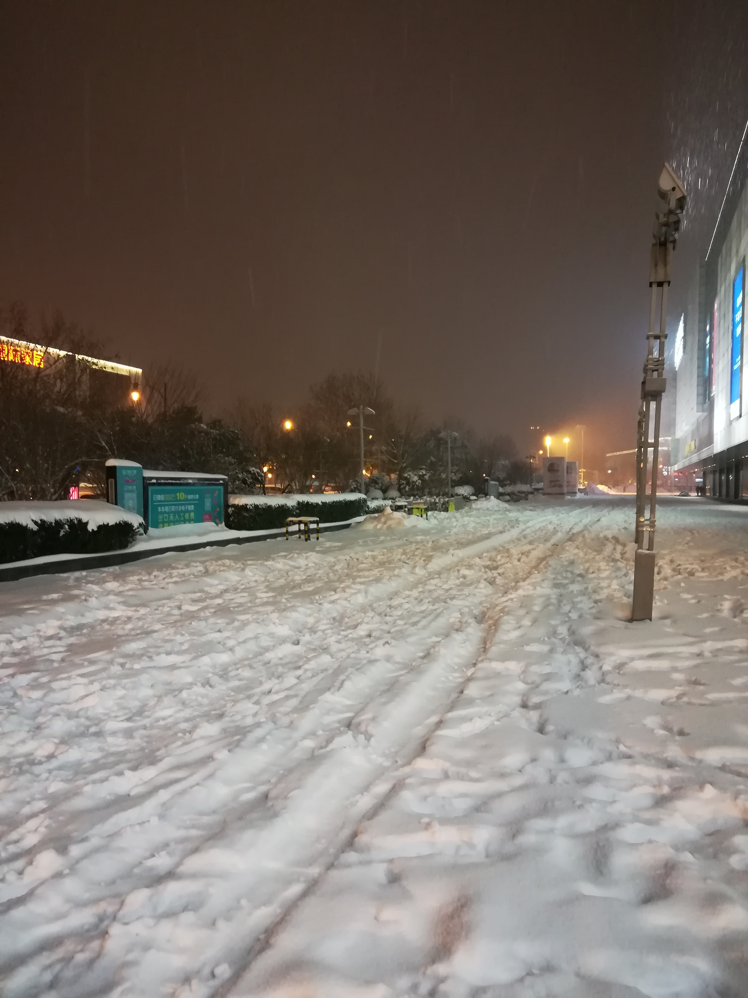 万达广场（万达广场北公交站旁）